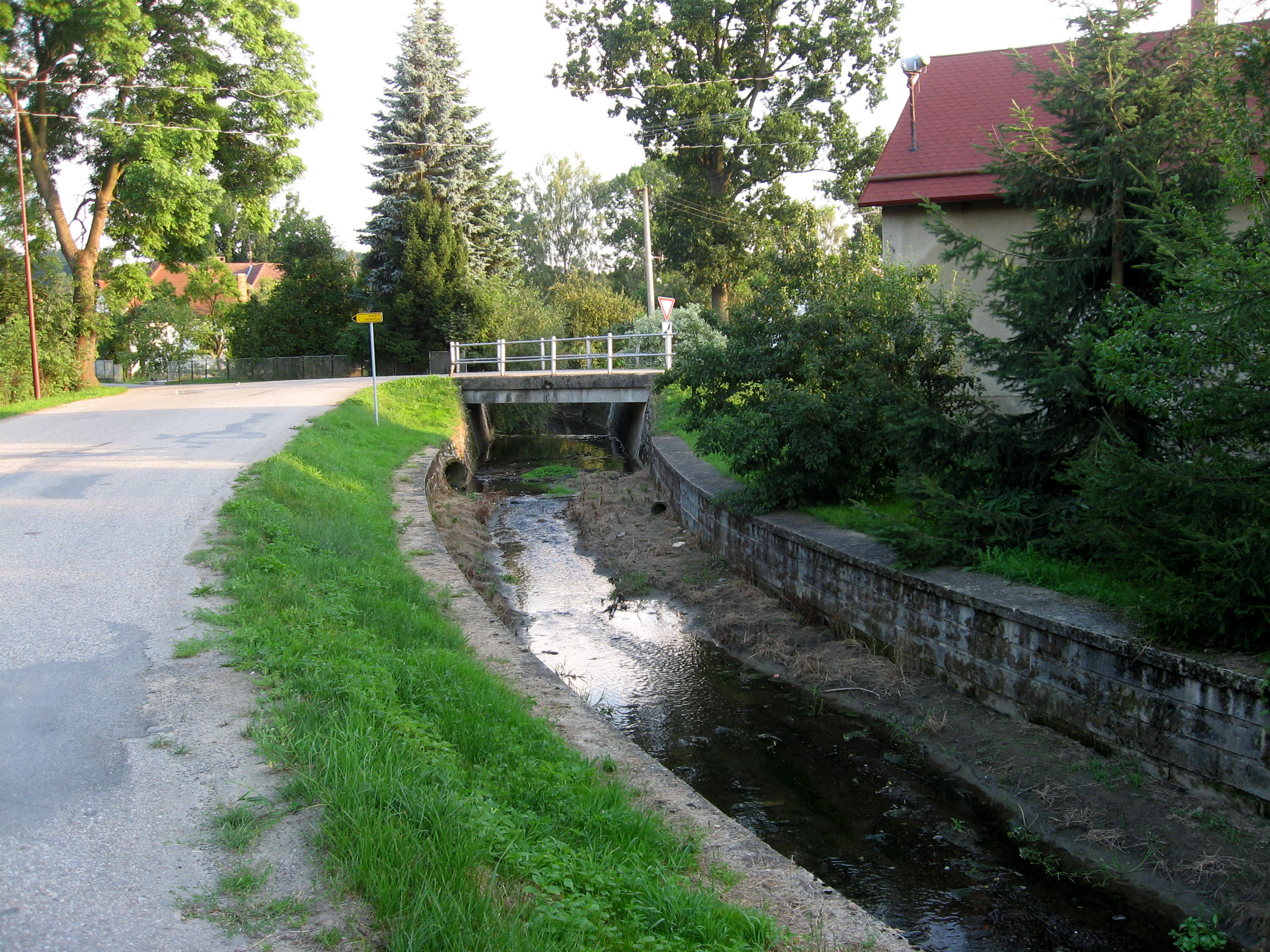 Velký Rybník, Kopaniský potok